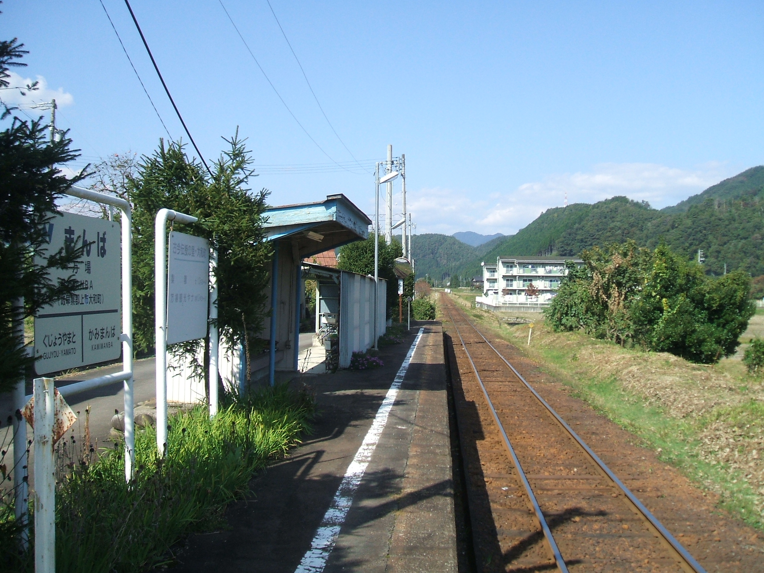 ホームの様子。